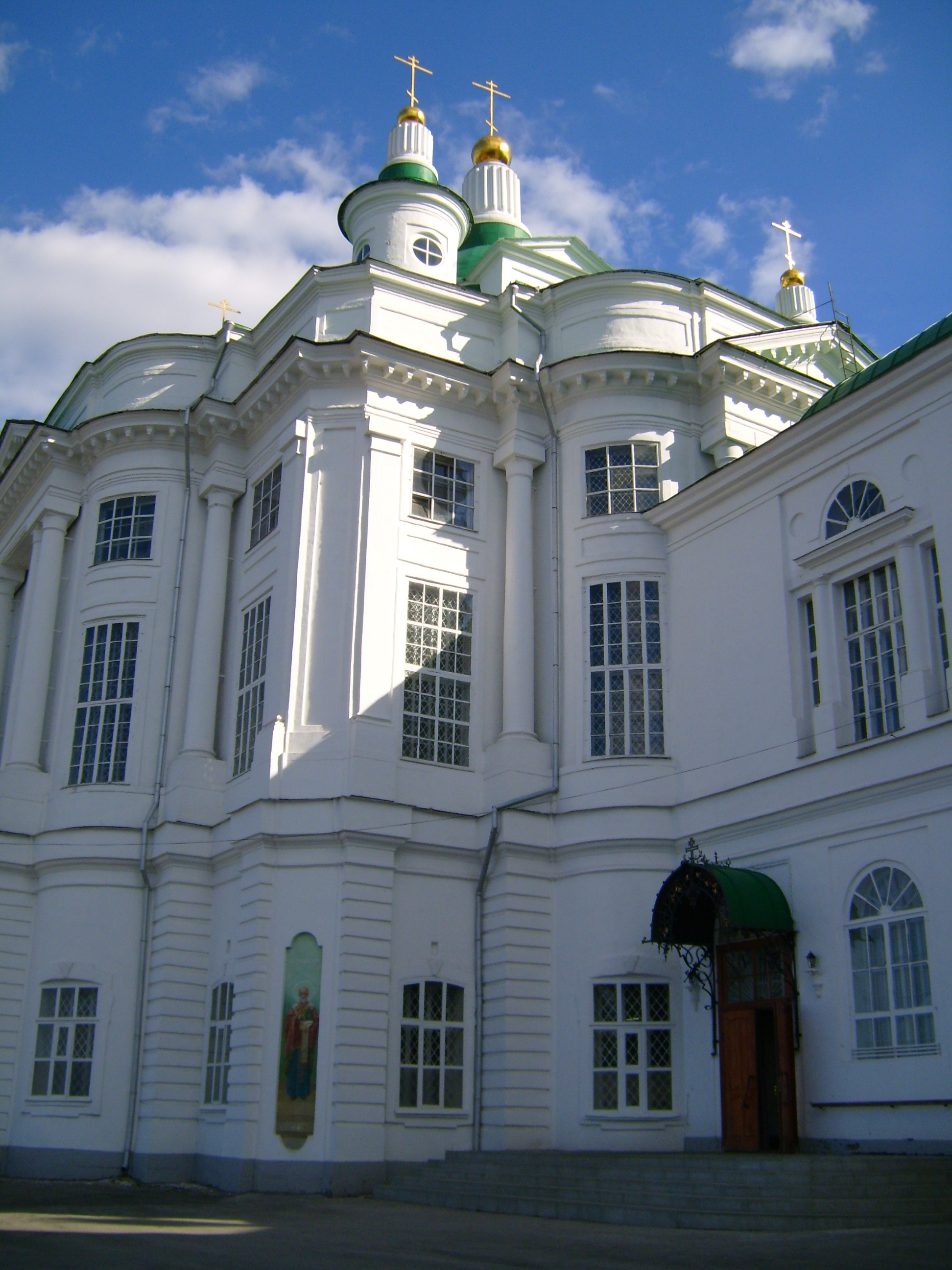 Всехсвятский кафедральный собор